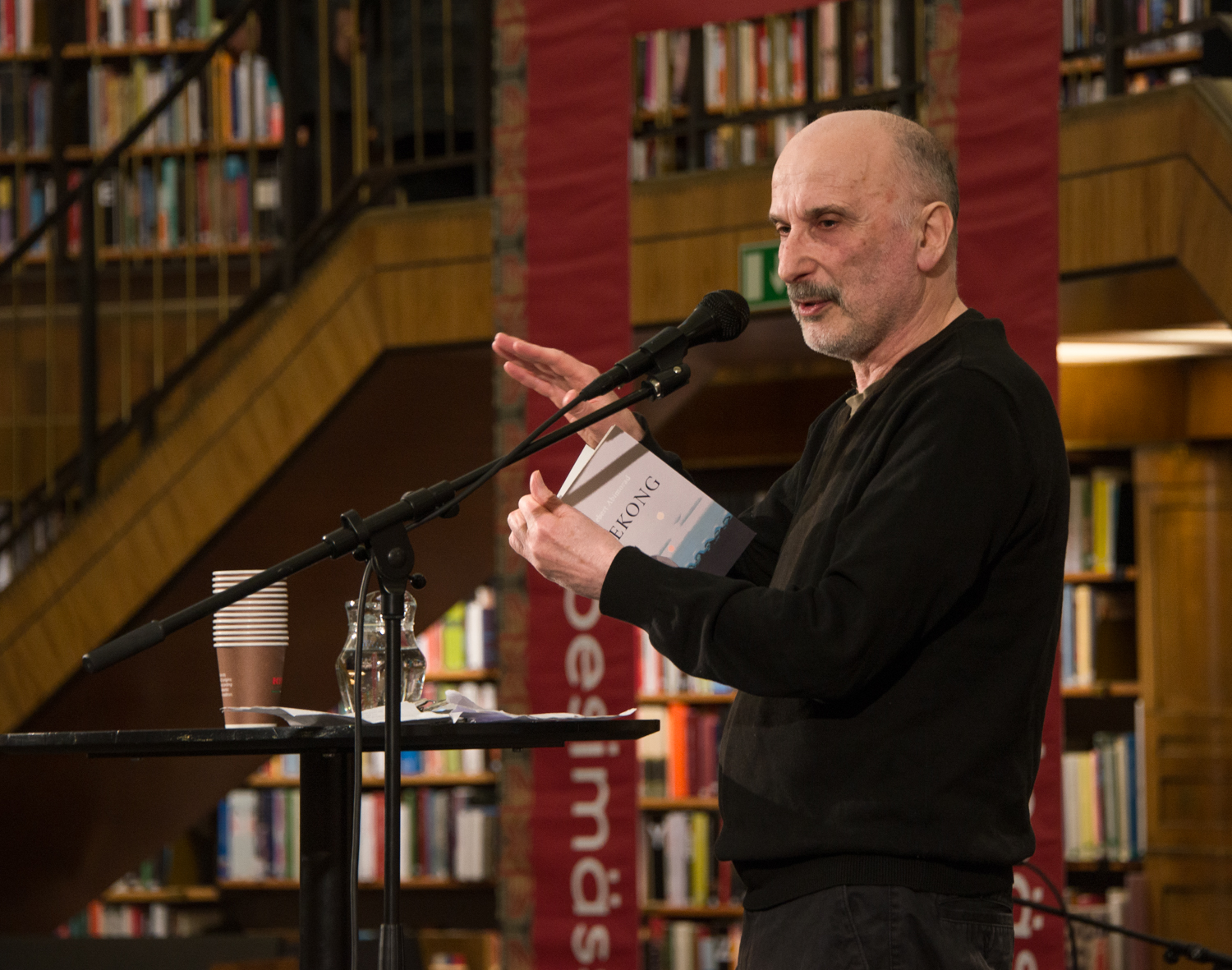 Hebert Abimorad på Poesimässan på Stockholms Stadsbibliotek den 23 mars 2018.